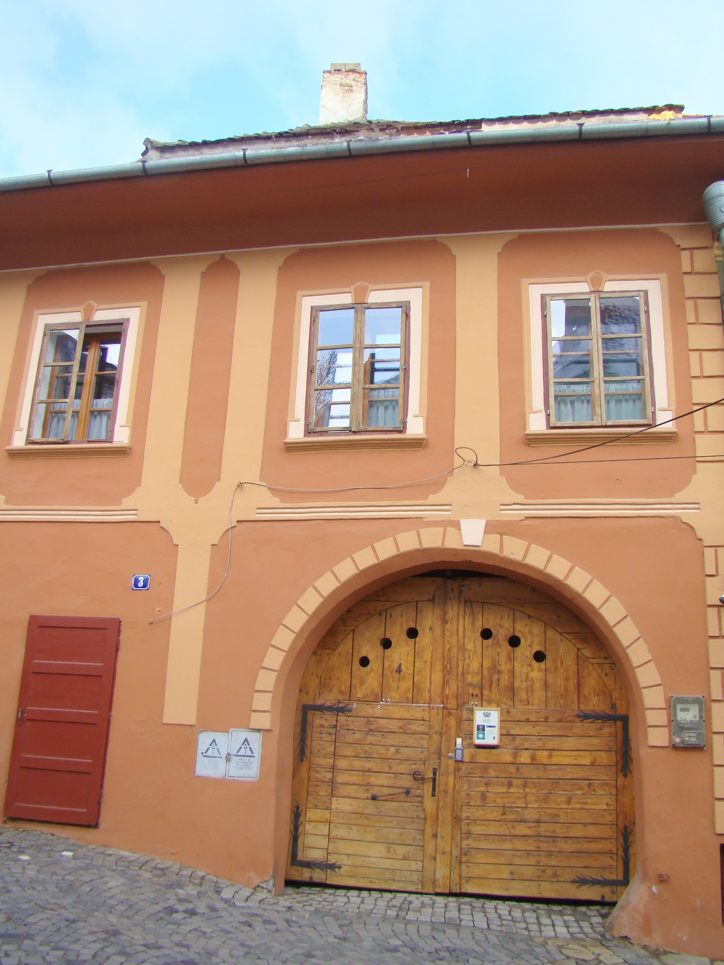 Casa Taschler, municipiul Sighișoara, Piața Oberth Hermann 4 1742, modif. sec. XX